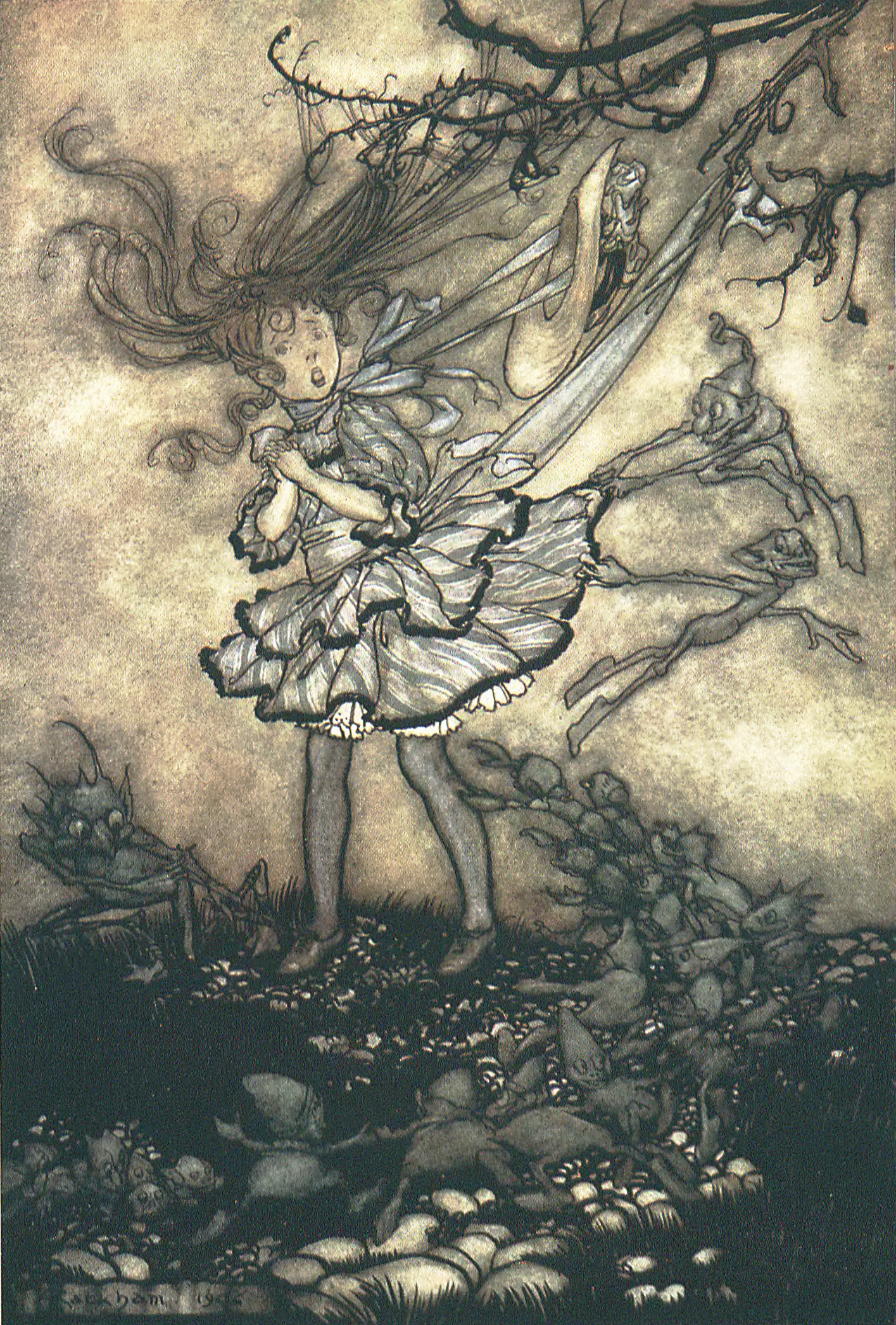 grafika z książki PL "Przygody Piotrusia Pana" publikacja Wydawnictwo J. Mortkowicza Warszawa 1914